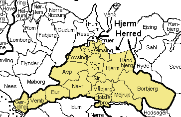 Hjerm Herred, Ringkøbing Amt, Denmark Map by Svend-Erik Christiansen , edited by Nico-dk.